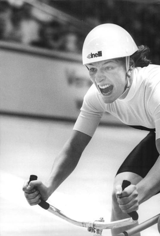 Petra Rossner ADN-ZB Settnik 20.12.87-Ge. Berlin: Winterbahn - Großen Anteil an den guten Ergebnissen bei den DDR-Hallenmeisterschaften im Radsport in der Werner-Seelenbinder-Halle hatten auch die Frauen. Dabei ist vor allem die Leipzigerin Petra Rossner zu sehen. Nach dem Gewinn des Punktefahrens war sie auch in der 3000m-Einzelverfolgung siegreich (Foto).